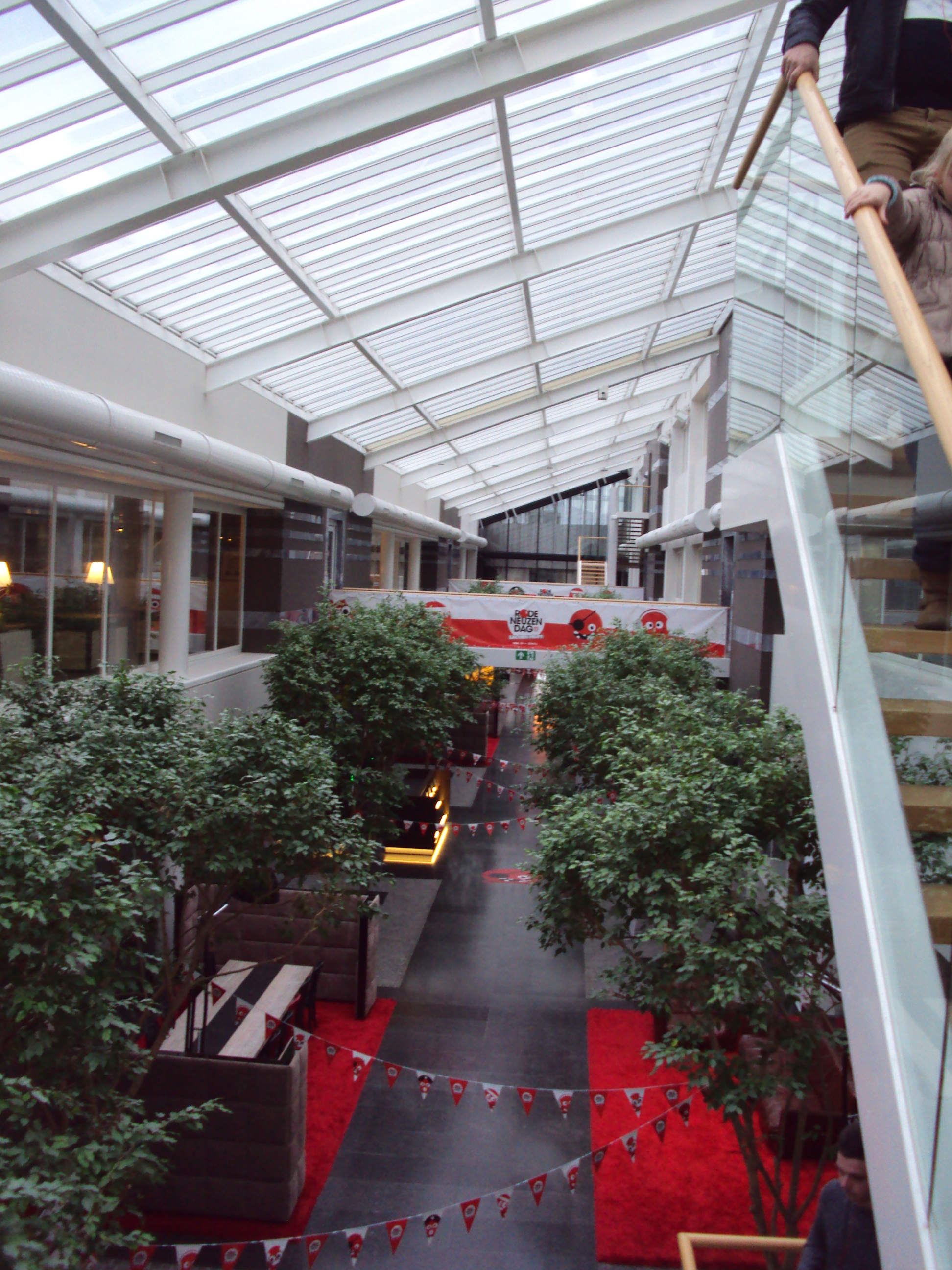 Binnenkant gebouw van Medialaan in Vilvoorde (België)